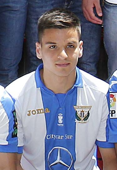 Felicidades pepineros!! Vuestro ascenso a Primera es la historia de un sueño, el resultado de vuestro trabajo y esfuerzo. Sois un orgullo para todo Madrid! Enhorabuena CD Leganés. #LeganésEsDePrimera